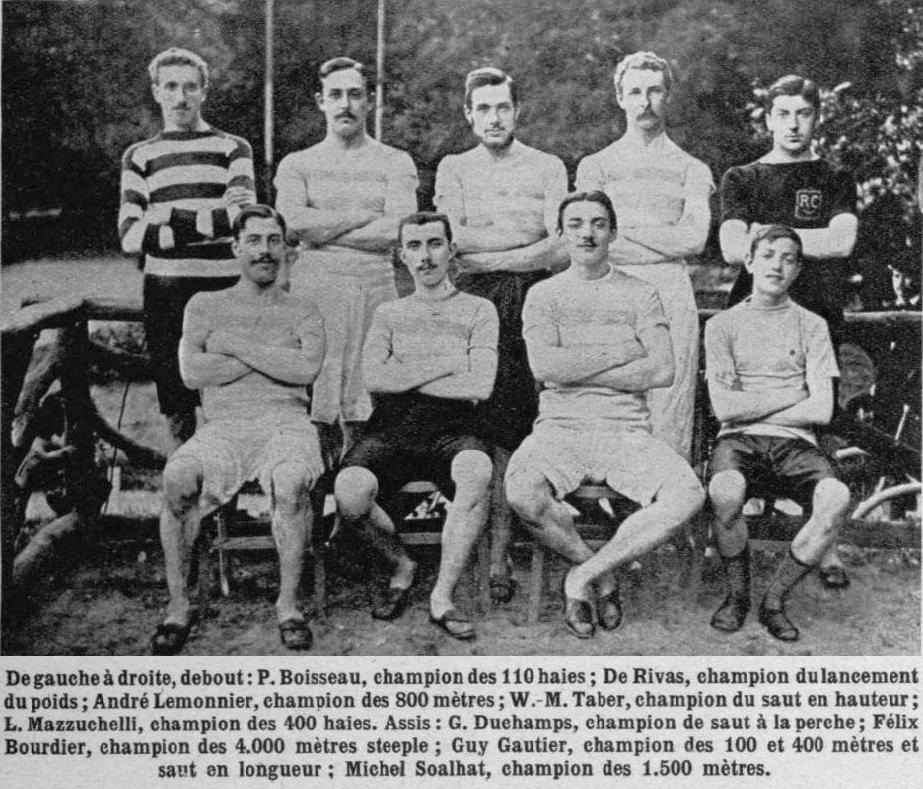 Les Champions de France d'athlétisme en 1894.